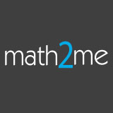 math2me logo